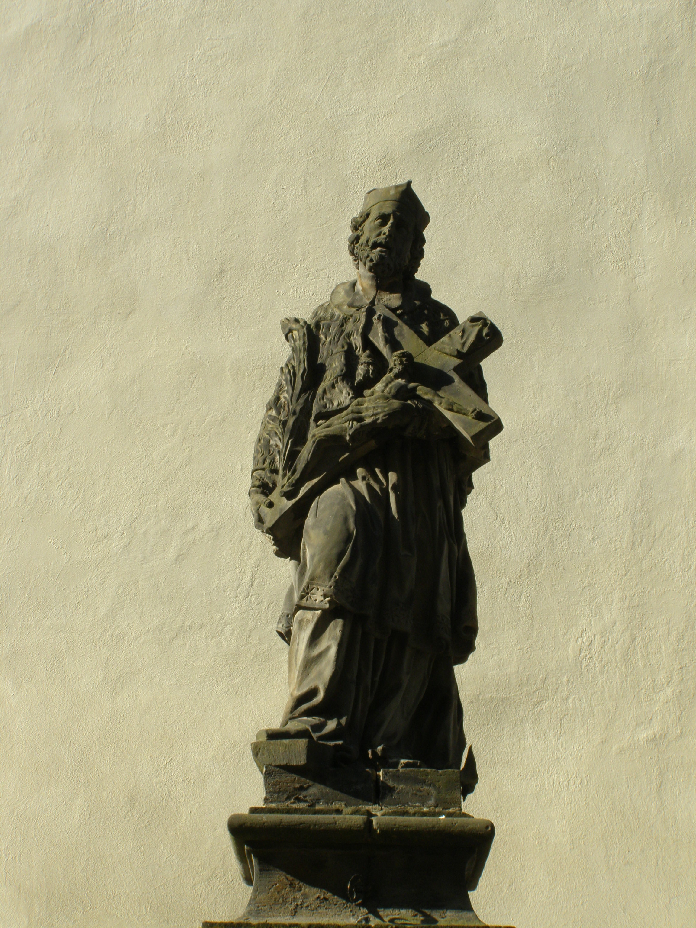 Praha, Malá Strana, ulice Říční, socha sv. Jana Nepomuckého u kostela sv. Jana Křtitele